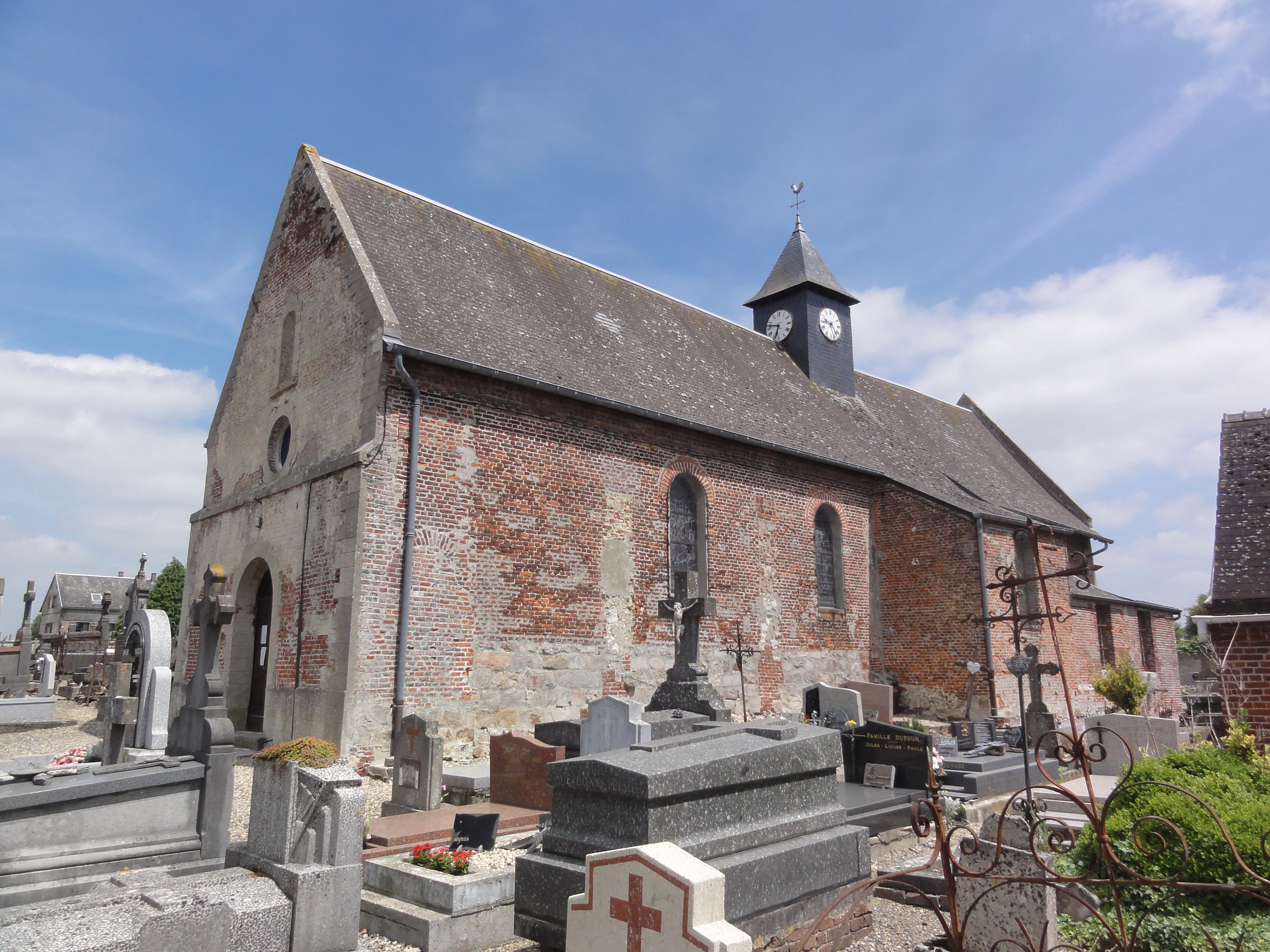 Villers-lès-Guise (Aisne) église